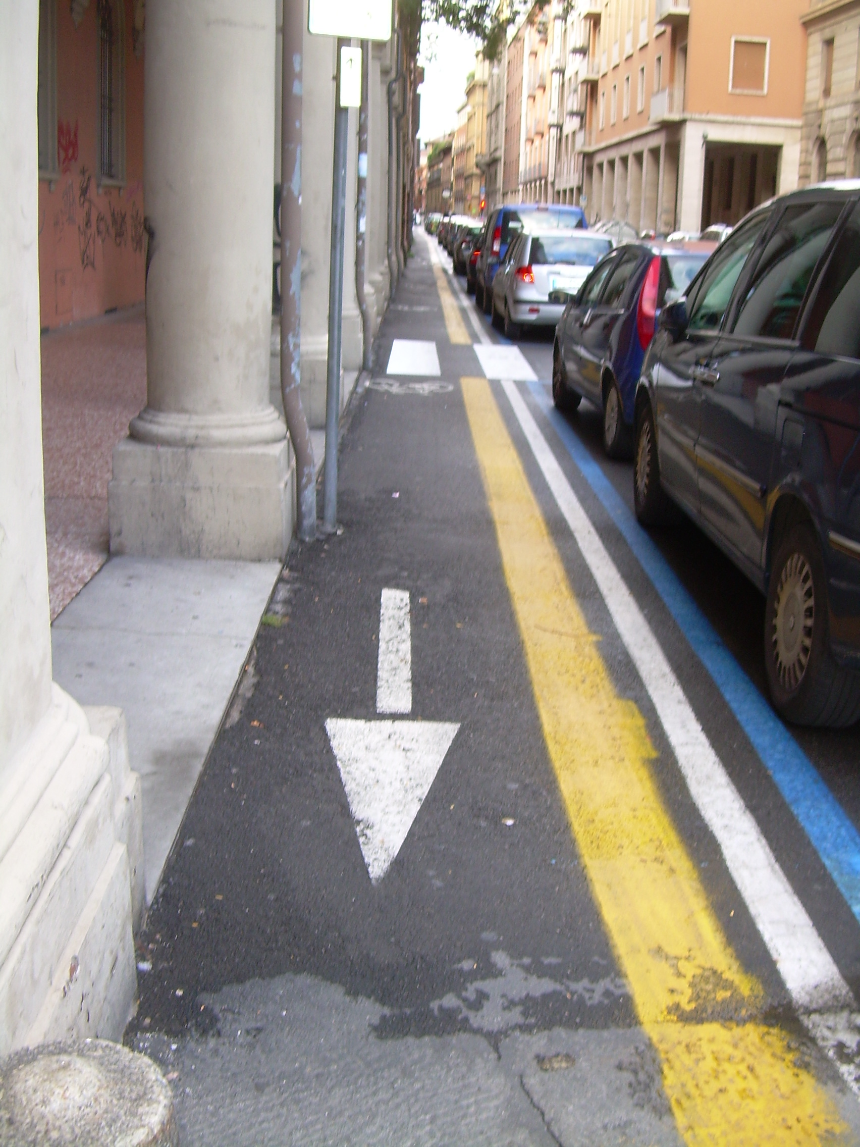 Pista ciclabile come corsia riservata fra marciapiede e posteggi ai lati della corsia: Bologna, via Galliera.